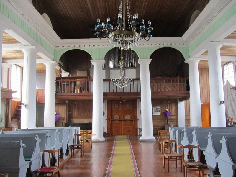 Жырмуны. Касцёл Адшукання Святога Крыжа